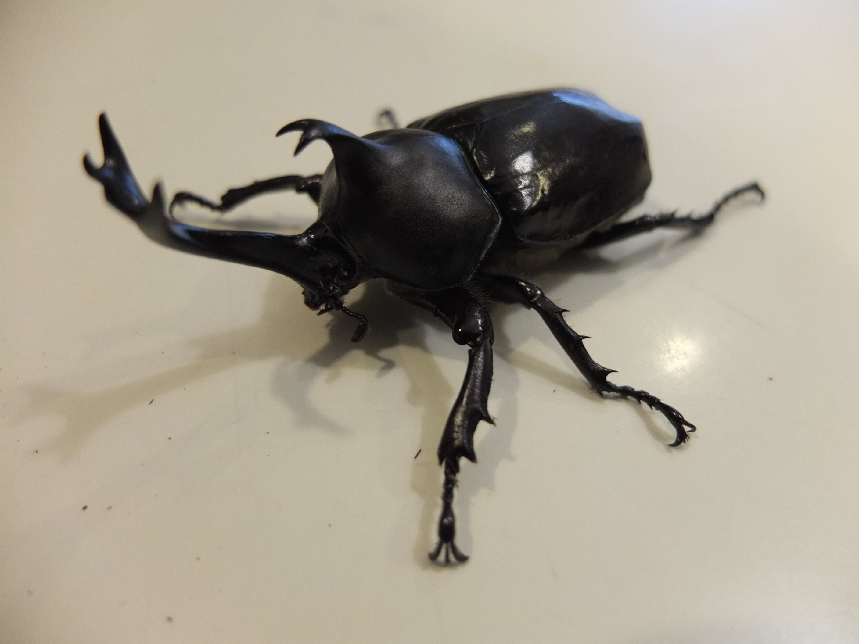 日本産カブトムシです。学名Trypoxylus dichotomus.体長82mm。